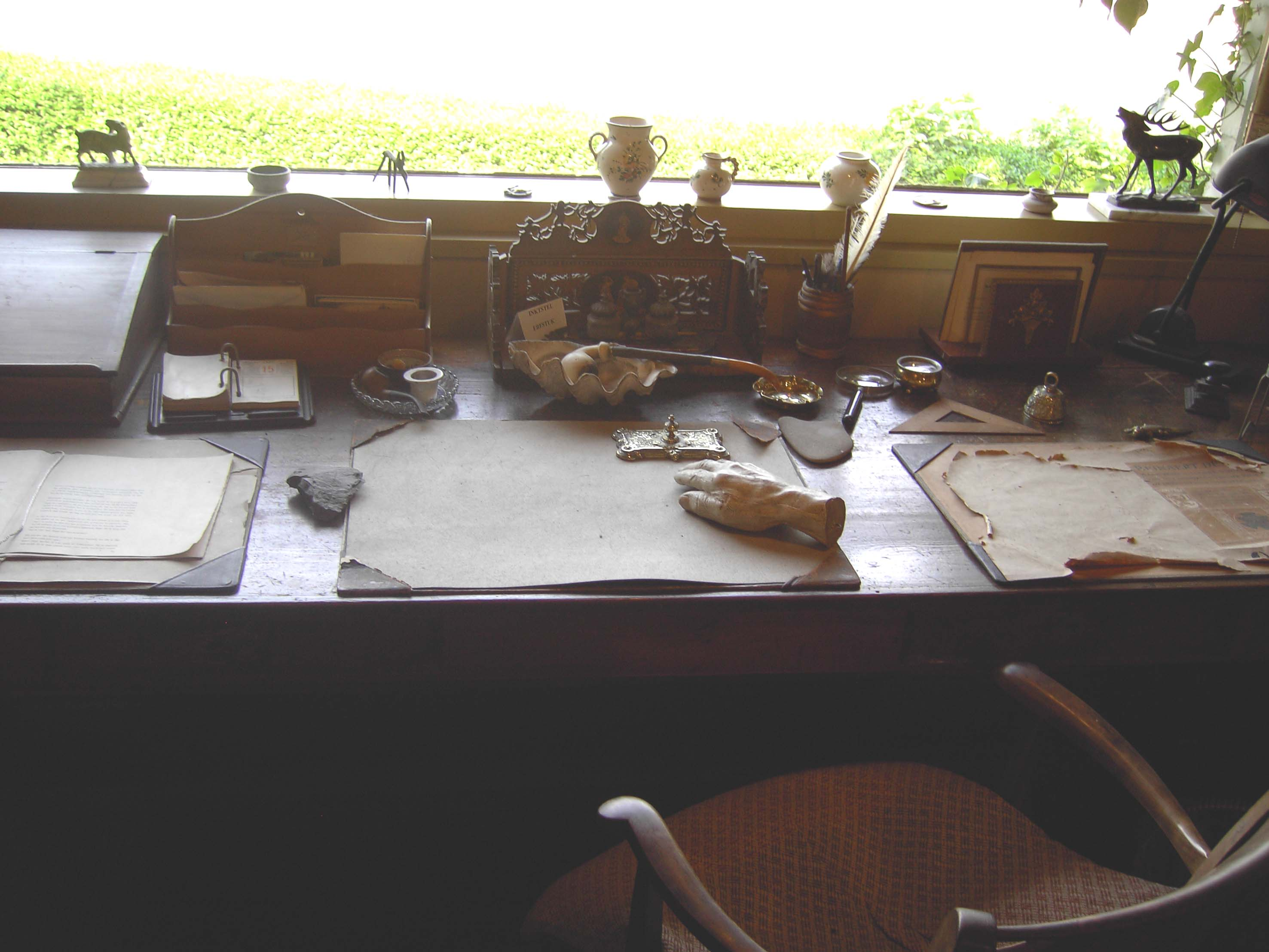 Lijsternest - bureel Streuvels - Stijn Streuvelsstraat - Ingooigem - Anzegem - West-Vlaanderen - België